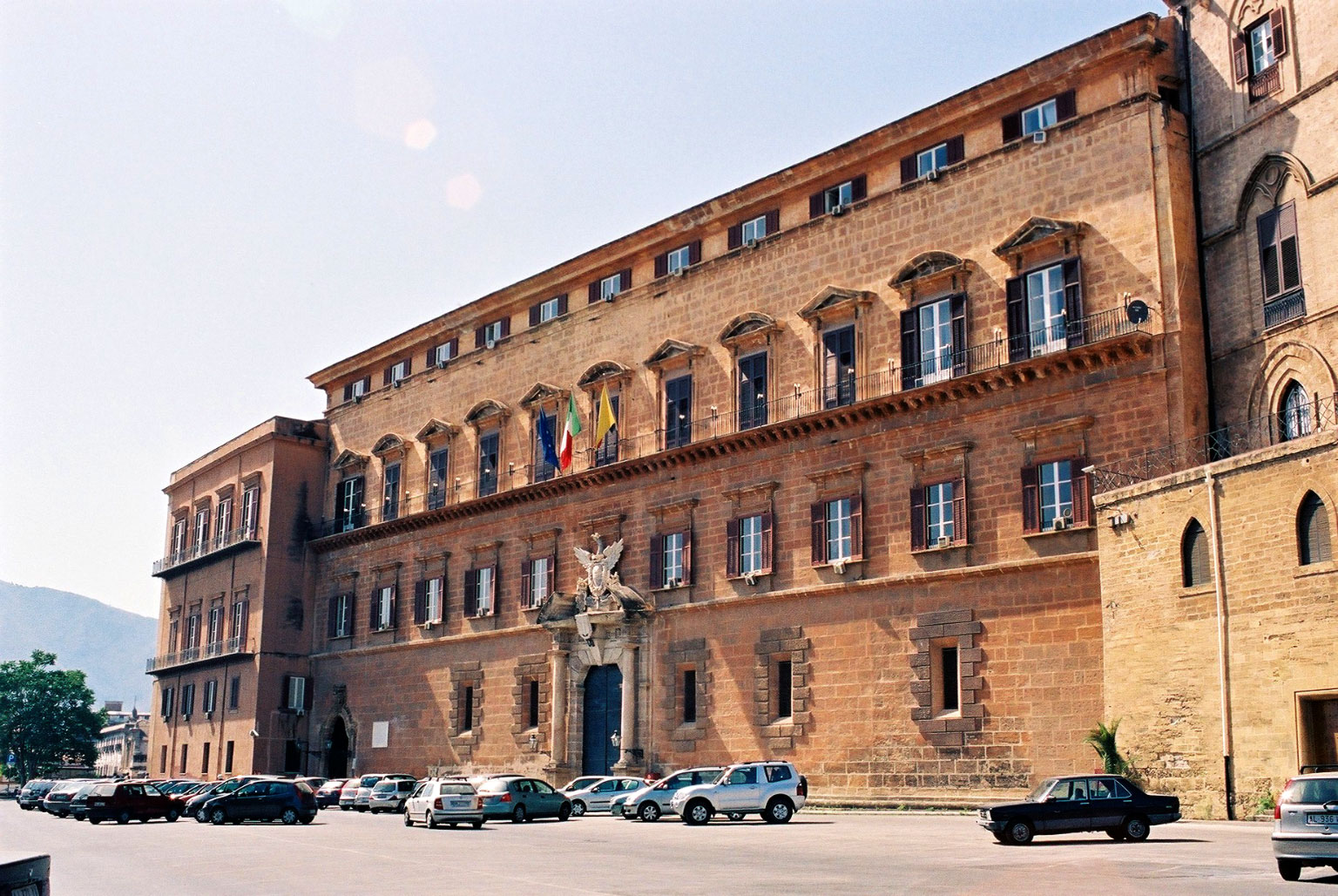 Palazzo dei Normanni, Palermo Renaissance wing